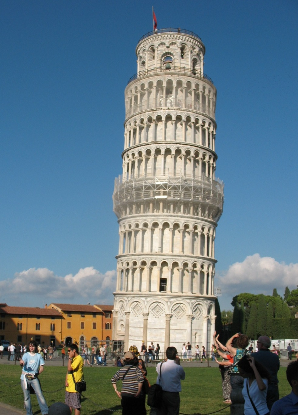 Пизанская башня